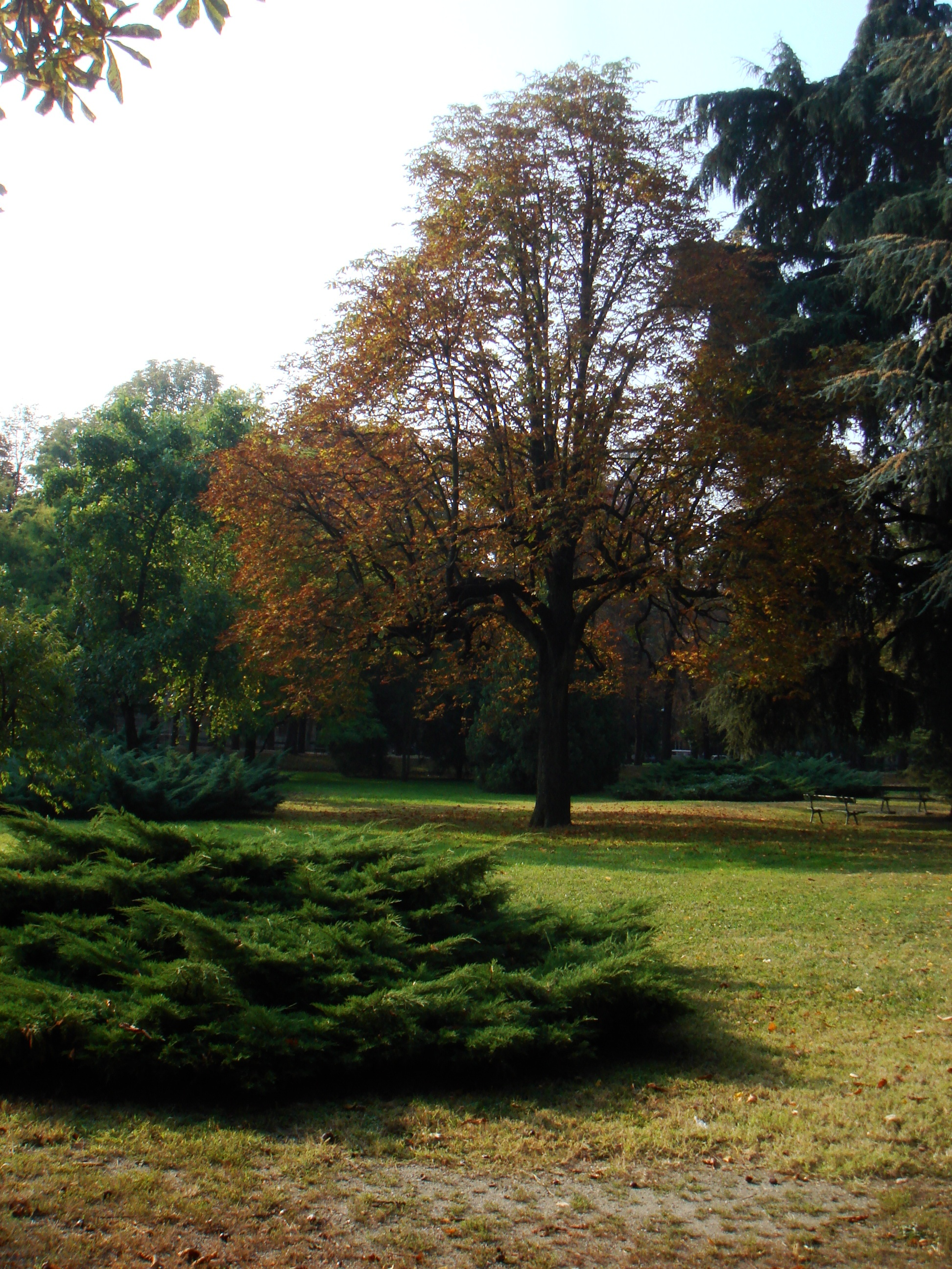 Giardini pubblici di Casale Monferrato. Foto di Stefano Bolognini.